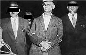 Rudolf Abels Verhaftung 21. Juni 1957. Als Martin Collins nicht registriert, wirft man ihm Vergehen gegen Einwanderungsbestimmungen vor, was längere Sicherungsverwahrung rechtfertigt.